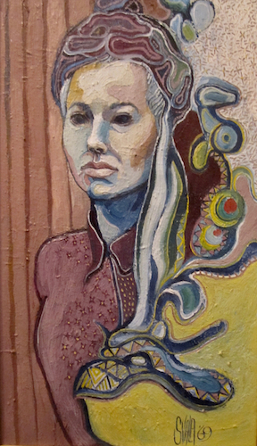 Svala Þórisdóttir, sjálfsmynd gerð 1969.